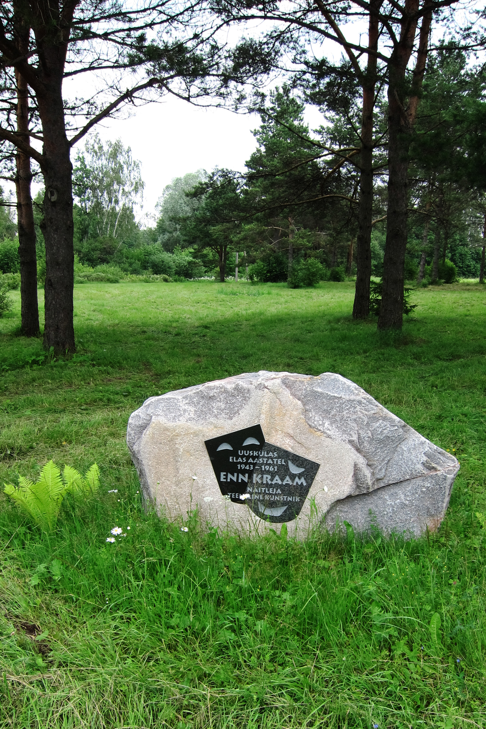 Mälestuskivi näitleja Enn Kraami (1943-2001) sünnikohas Raplas Uuskülas.